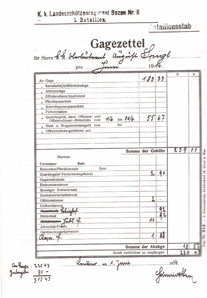 Gagezettel